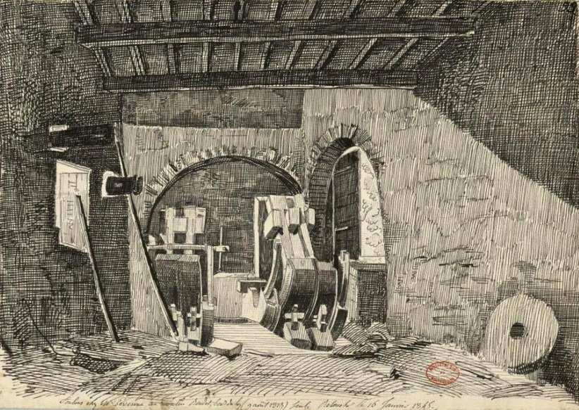 En 1823, Amelin réalise un dessin représentant les foulons du moulin